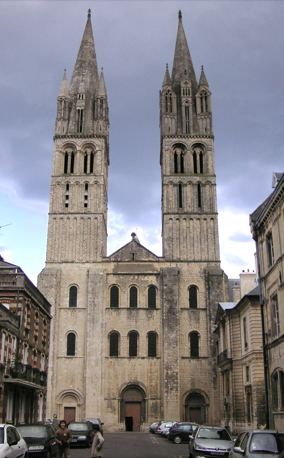 façade occidentale de l'église Saint-Étienne de l'abbaye aux Hommes à Caen (Calvados, Basse-Normandie).